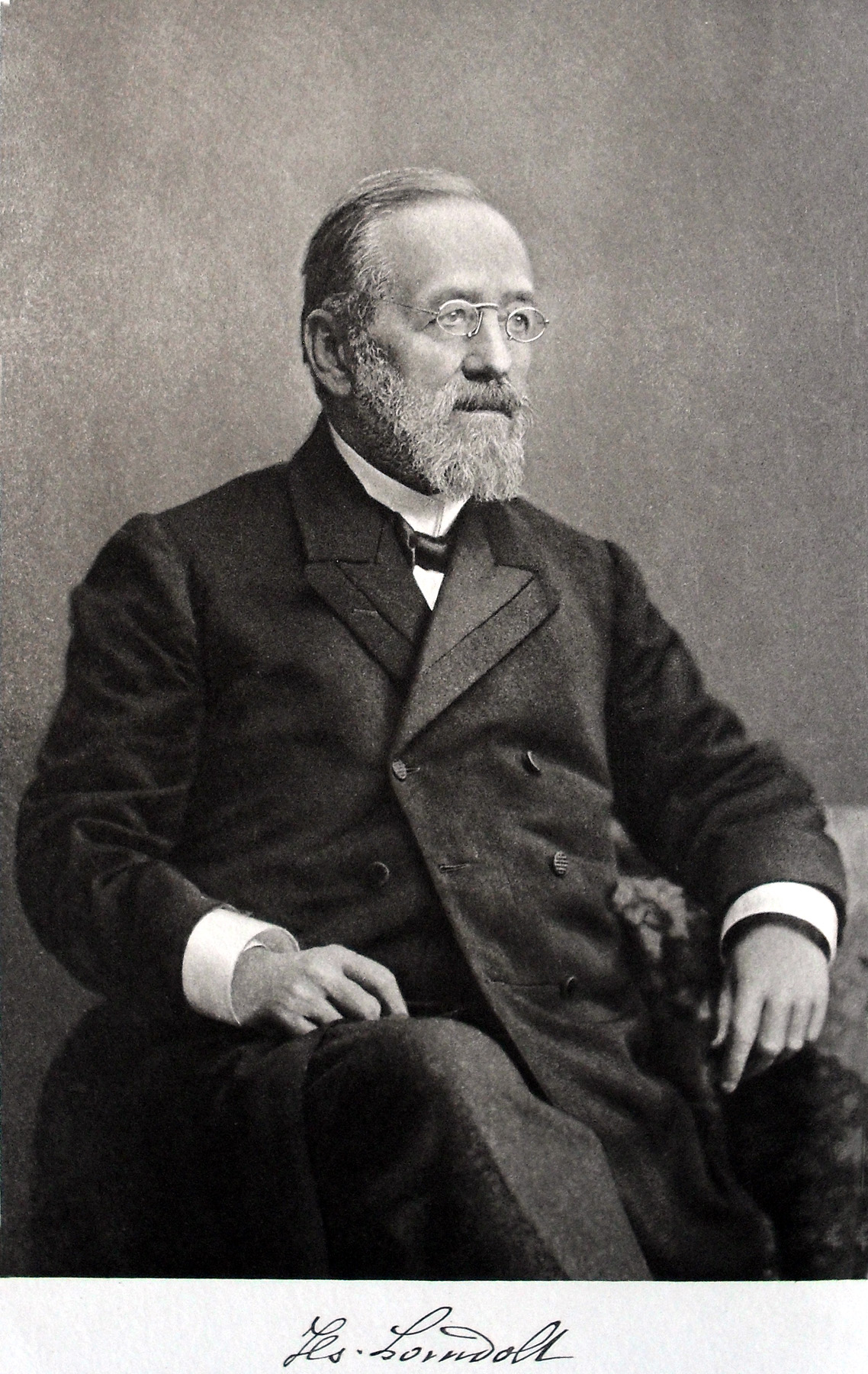 Hans Landolt (* 5. Dezember 1831 in Zürich; † 15. März 1910 in Deutsch-Wilmersdorf b. Berlin, Deutschland)